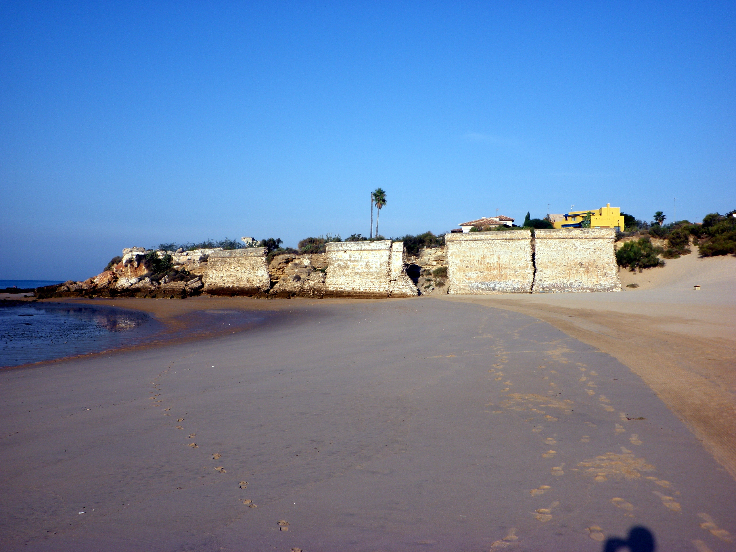 Castillo de Santa Catalina, El Puerto de Santa María, España.